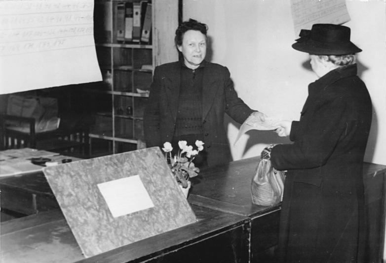 West-Staaken, Ausgabe von Lebensmittelkarten Illus Schmidtke 8.2.1951 Besuch in West-Staaken. Das Gebiet von West-Staaken bei Berlin wurde am 1.2.1951 in die Verwaltungshoheit des Demokratkischen Magistrats übergeben. West-Staaken stand auf Grund von Verträgen als sowjetisches Interessengebiet bisher unter dem Schutz der Sicherheitsorgane der DDR UBz: Trotz aller verleumderischen Meldungen der Westzeitungen holen sich die West-Staakener ihre Lebensmittel- und Kohlenkarten.